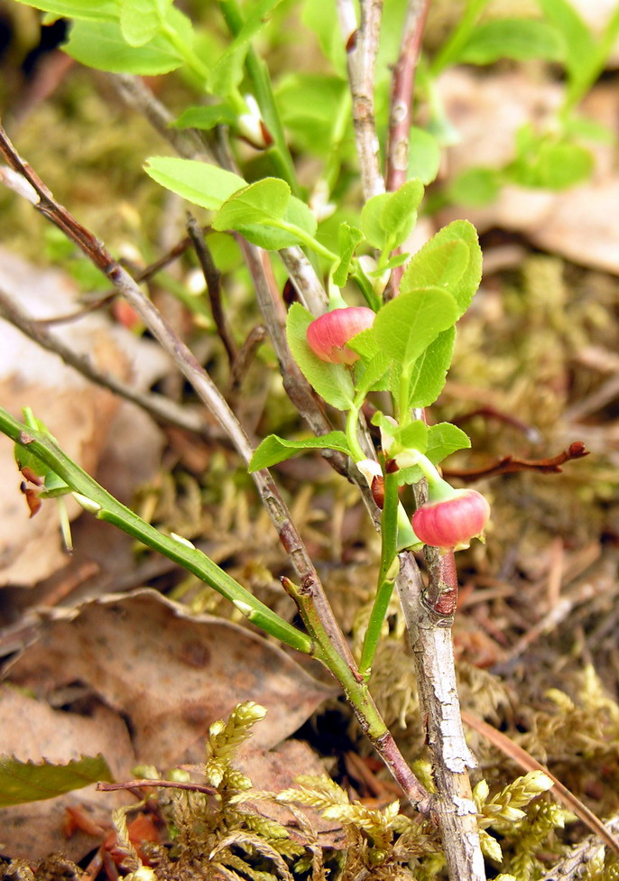 Mėlynės (Vaccinium myrtillus) žiedai Šeima. Erikiniai (Ericaceae) Foto: Algirdas, 2006 m. gegužės 20 d., Lietuva